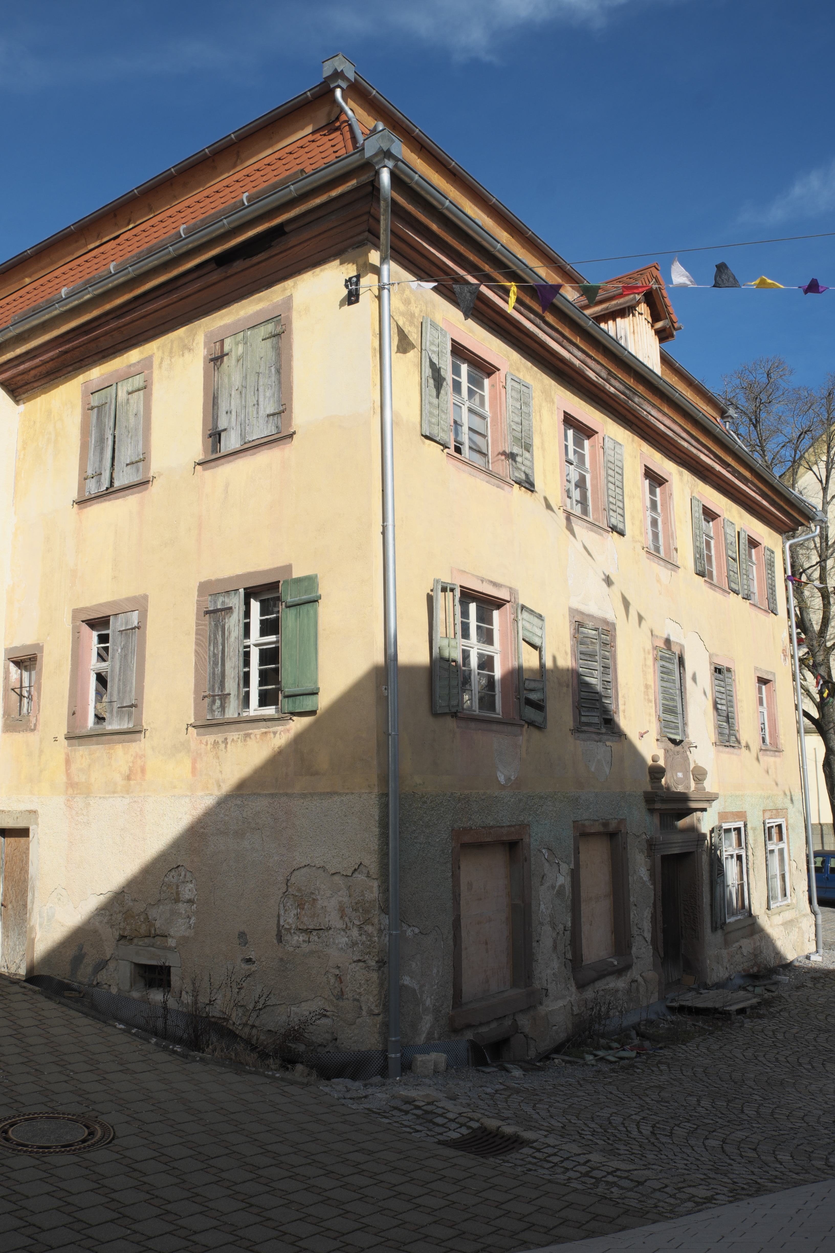 Gasthaus Rössle in Trillfingen (Haigerloch) im Zollernalbkreis (Baden-Württemberg/Deutschland)